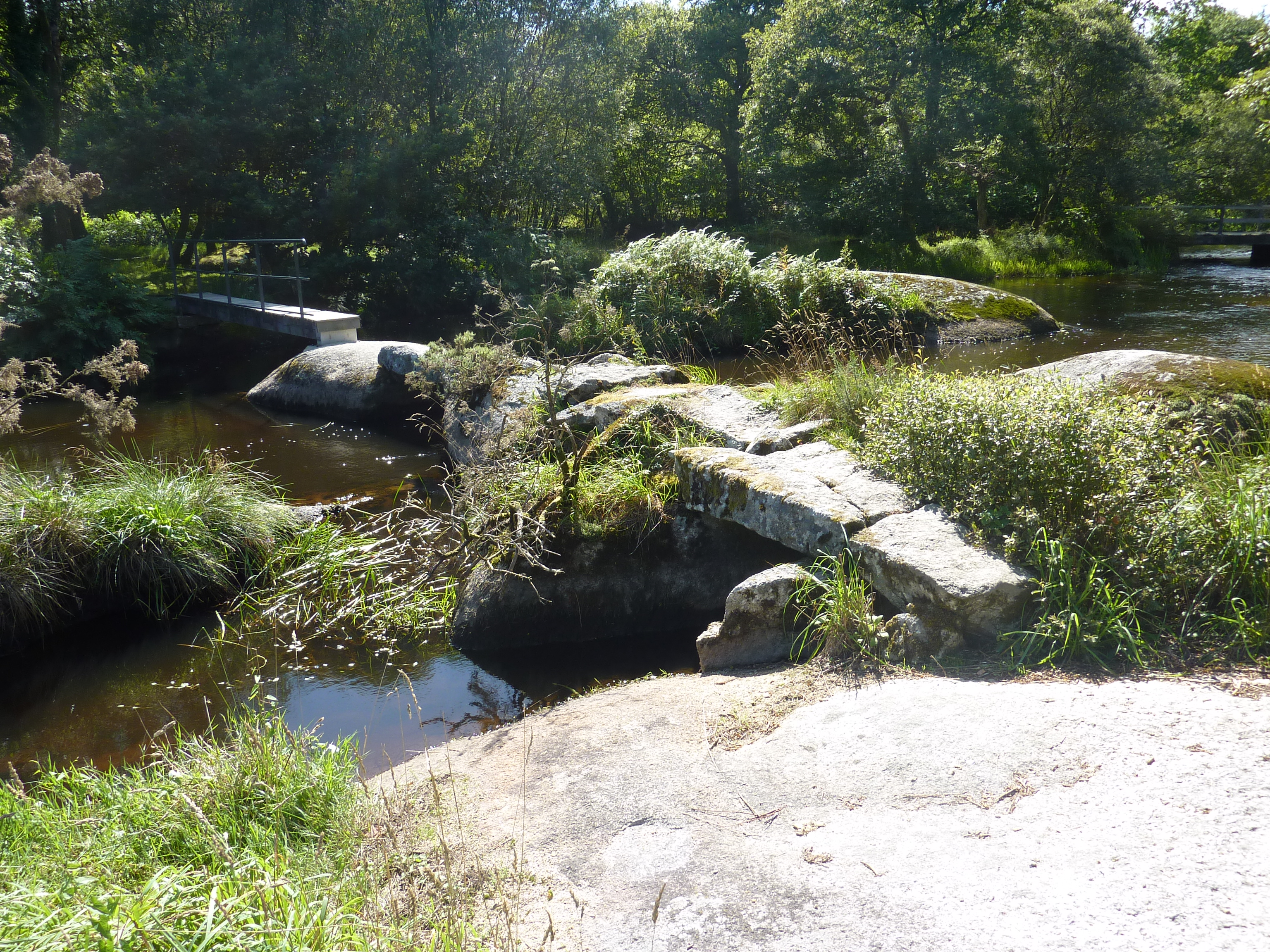 Ellez (limite Loqueffret-Brennilis) : gué de Mardoul, ancien pont amont